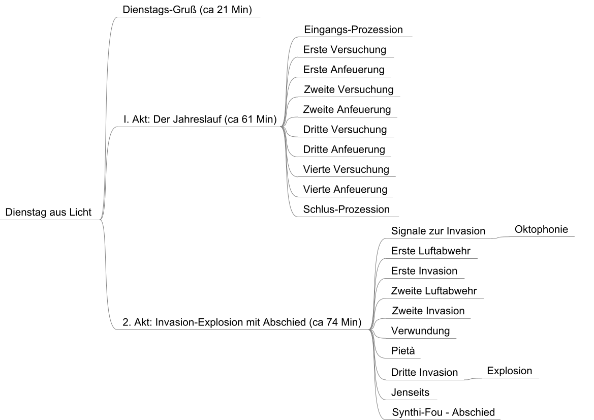 Karlheinz Stockhauseni ooperi "Dienstag aus Licht" ülesehitus esitatud mõttekaardina